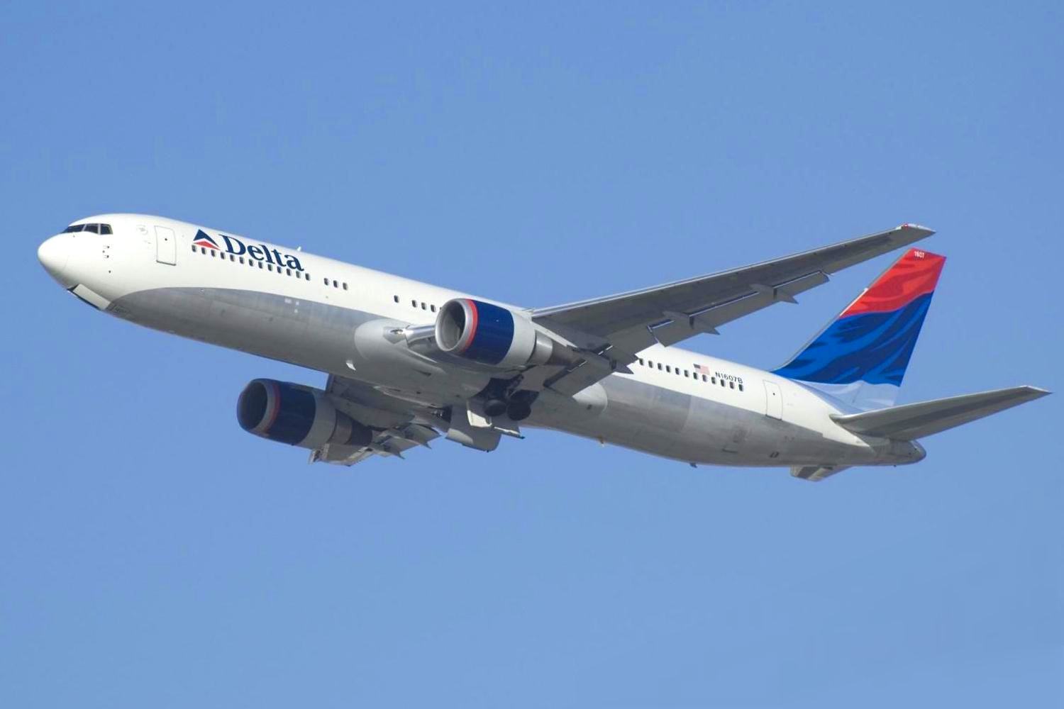 departing LAX